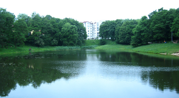 Алтайские, они же Гипсовые, они же Песковые озера во Львове